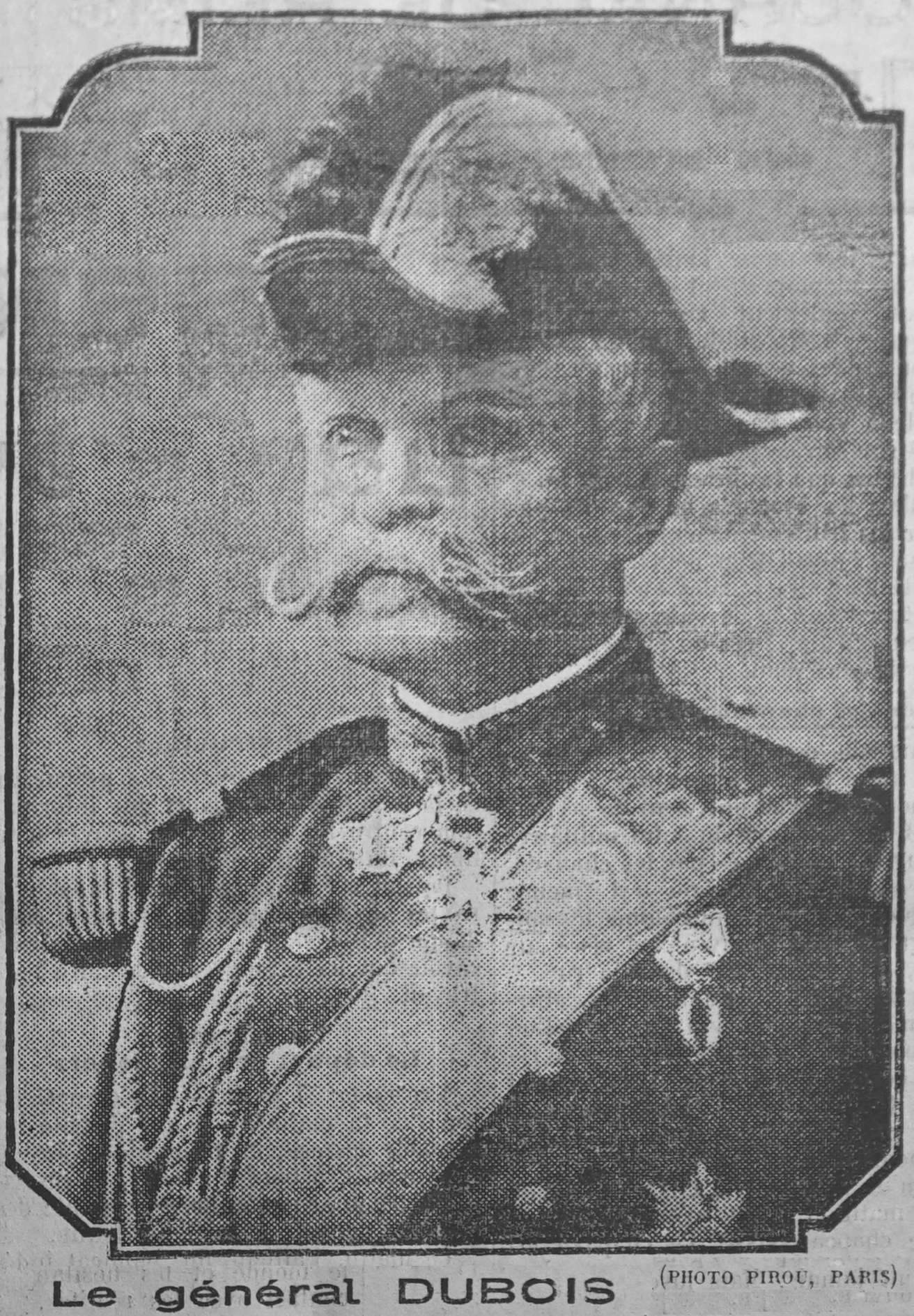 Courrier de la Champagne, le général en campagne pour les élections locales.